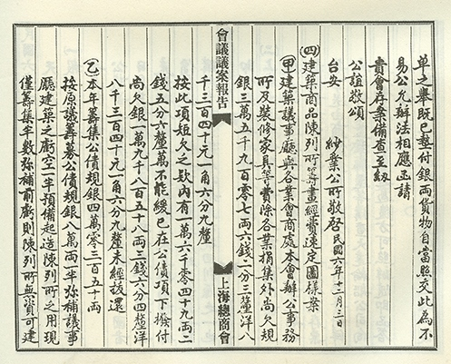 中文（香港）: 上海总商会会议议案报告